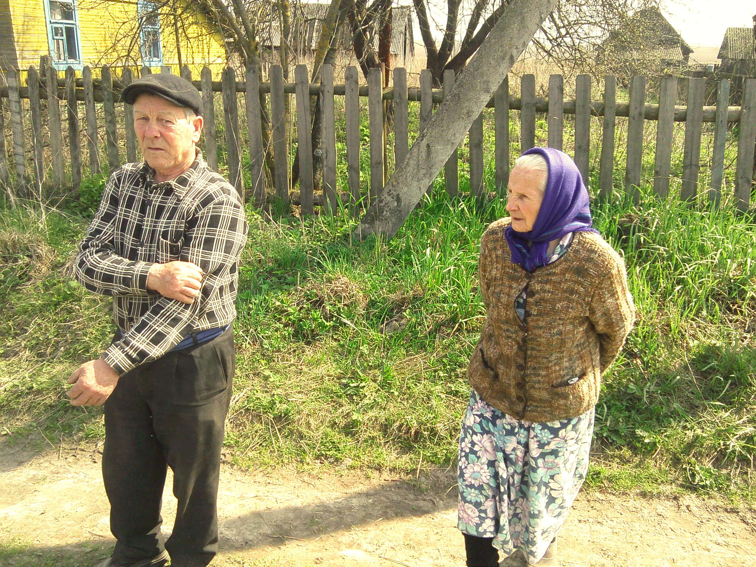 Местные жители встретились на улице и ожидают технику для с\х работ. Съемка - весна 2014 г.